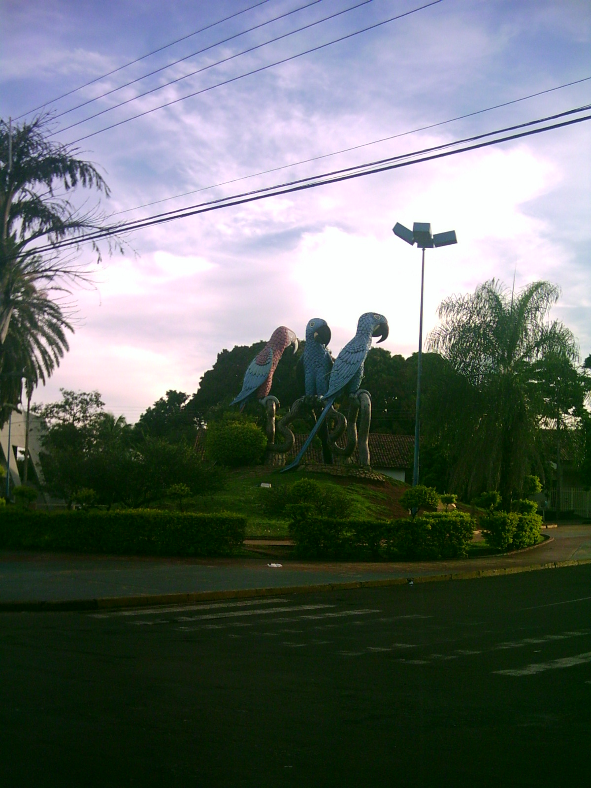 Foto da Praça das Araras - Campo Grande